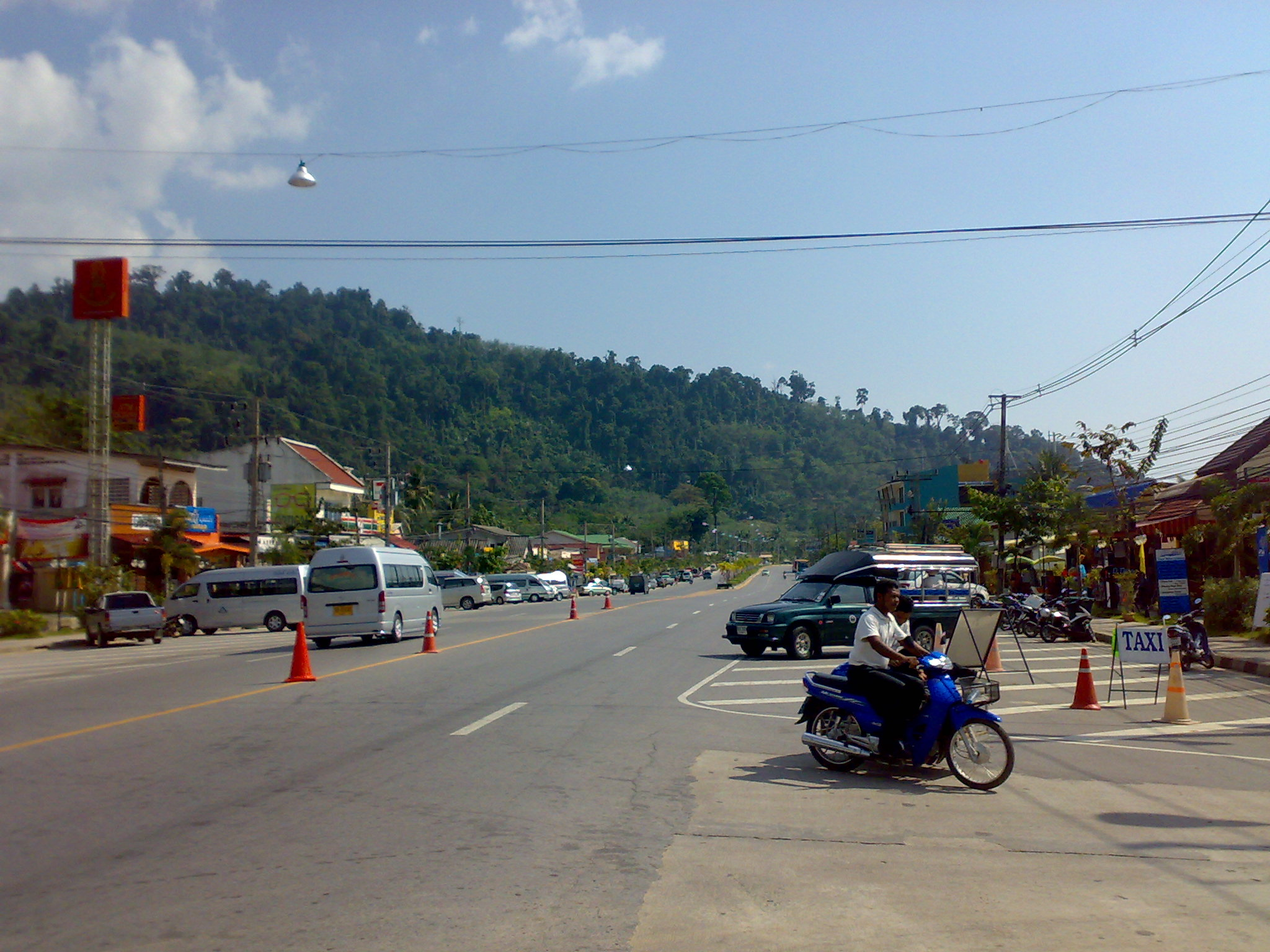 Nang Thong village (Ban Bang La On), Khao Lak, Takua Pa, Phang-Nga, Thailand